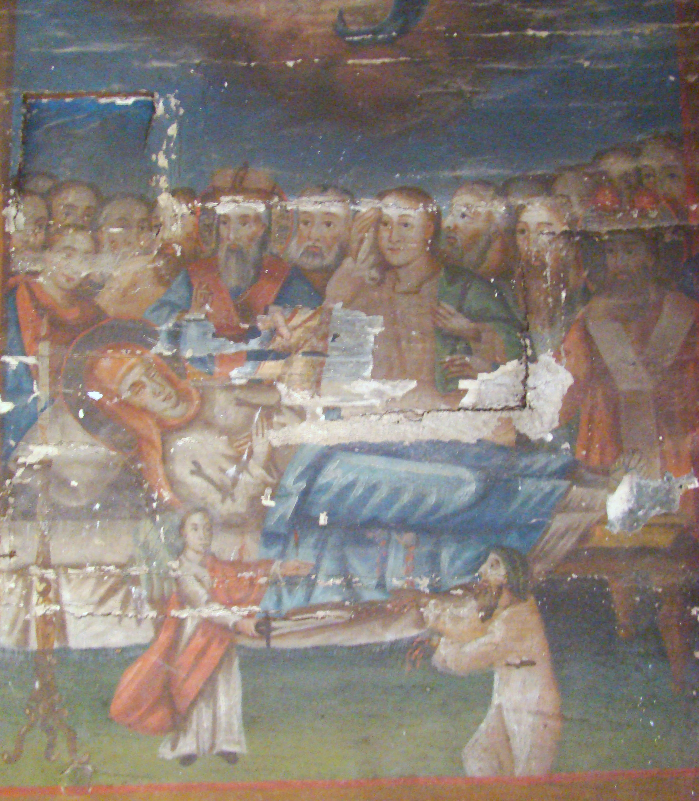 Biserica de lemn „Sfântul Mare Mucenic Gheorghe” din Ionești, județul Arad